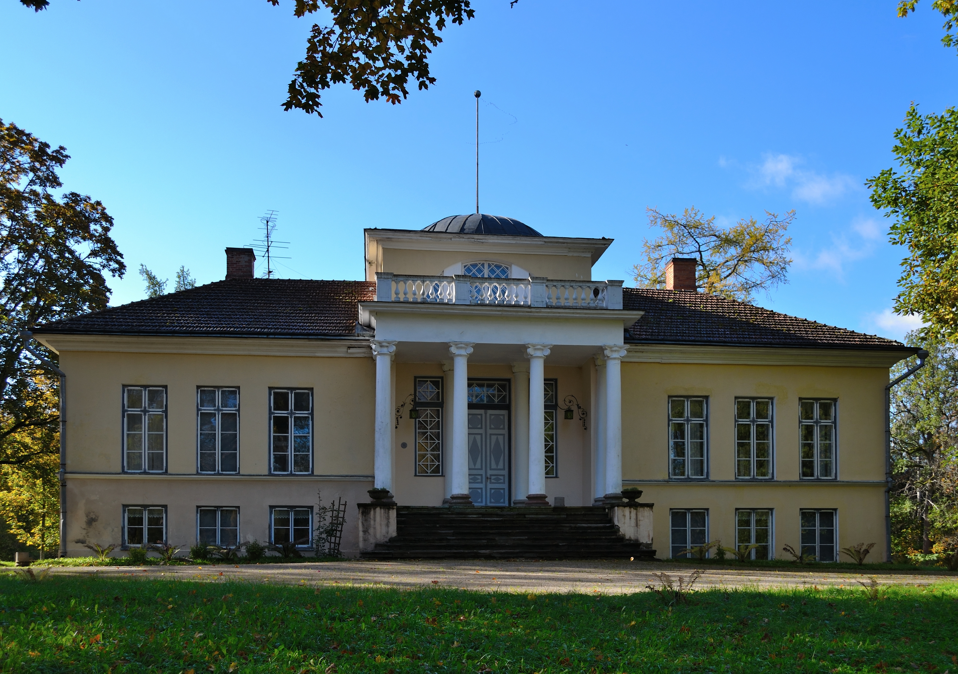 Pirgu mõisa peahoone